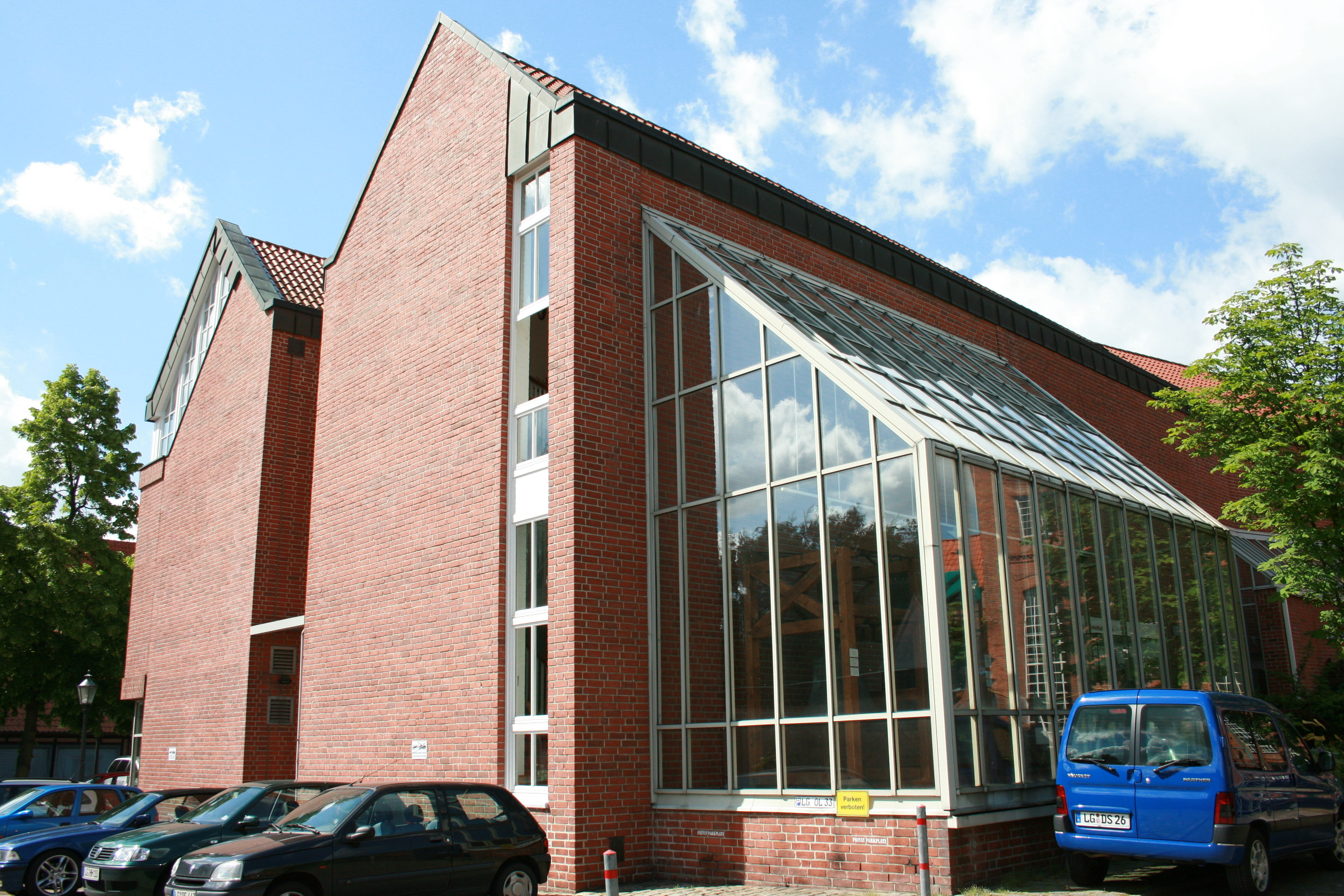 Ostpreußisches Landesmuseum, Heiligengeiststraße in Lüneburg